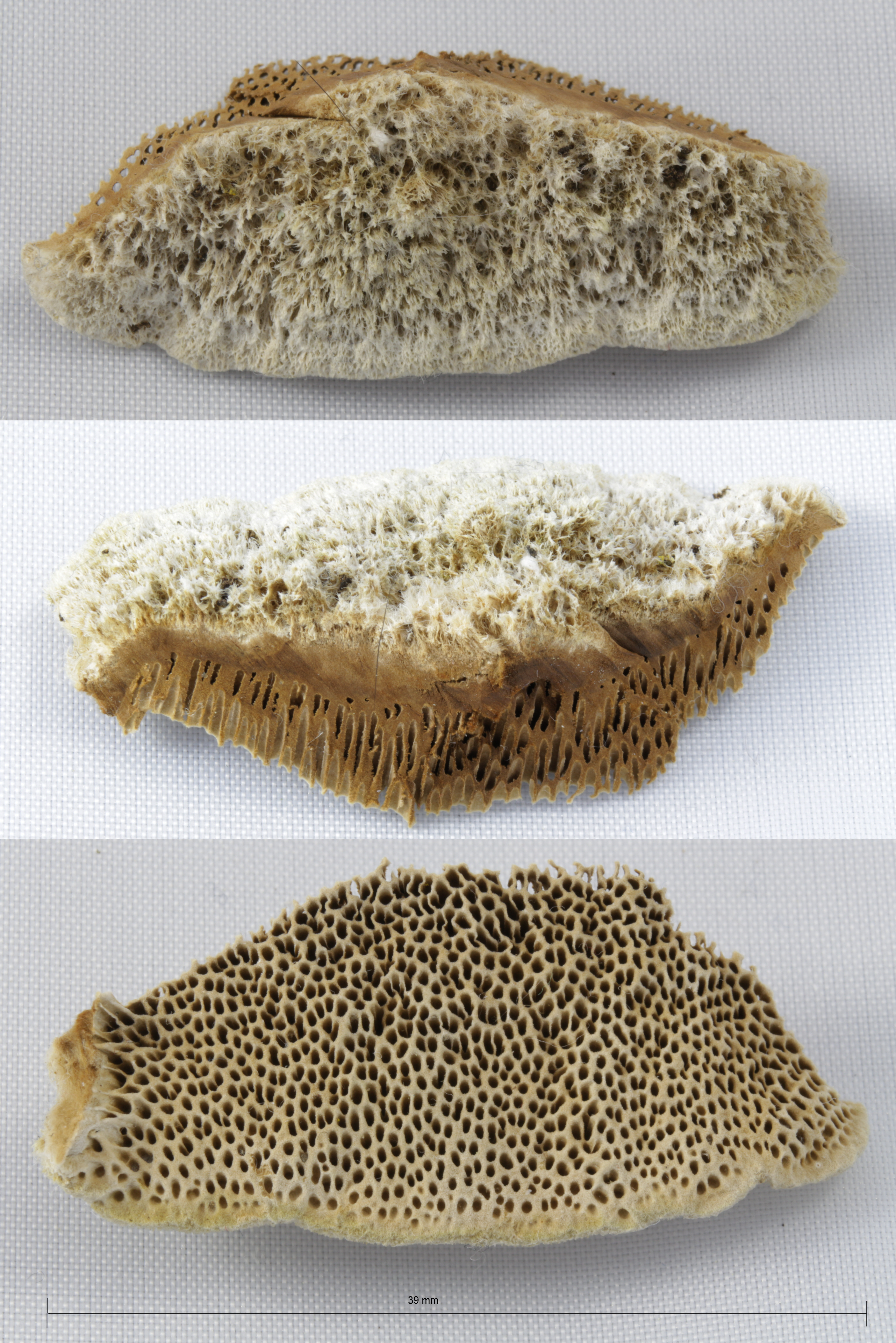 Baumpilz, Braune Borstentramete Coriolopsis gallica 39mm breit